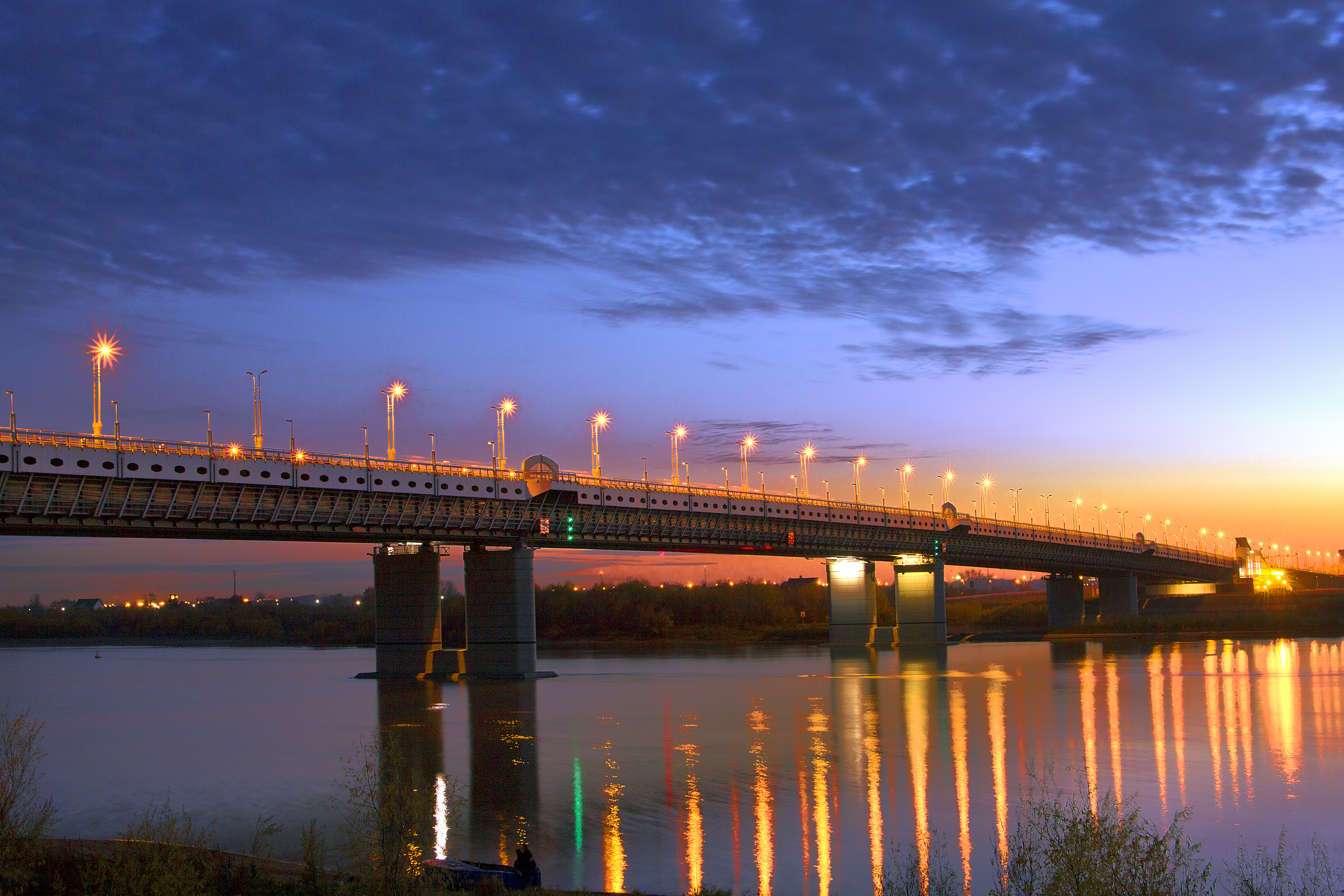 Уникальное сооружение Мост имени 60-летия Победы — совмещённый автомобильный и метромост через реку Иртыш в городе Омске. Через мост будет проходить перегон между станциями «Заречная» и «Библиотека имени Пушкина» Омского метрополитена, а автомобильная часть моста соединяет улицы Фрунзе и Конева.